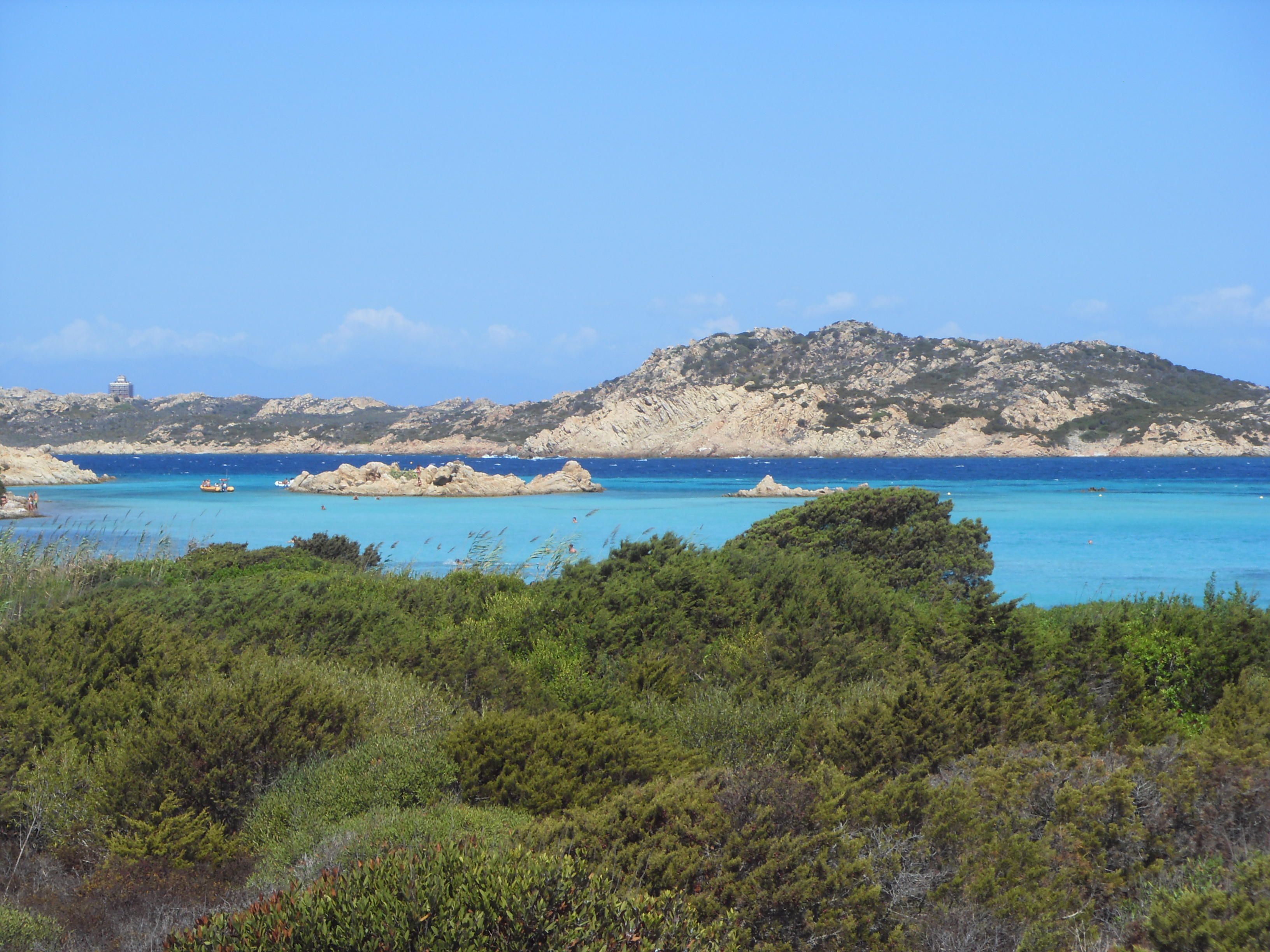 Parco Nazionale Arcipelago della Maddalena This is a photo of a monument which is part of cultural heritage of Italy.